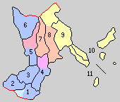 沖縄県中頭郡の町村。